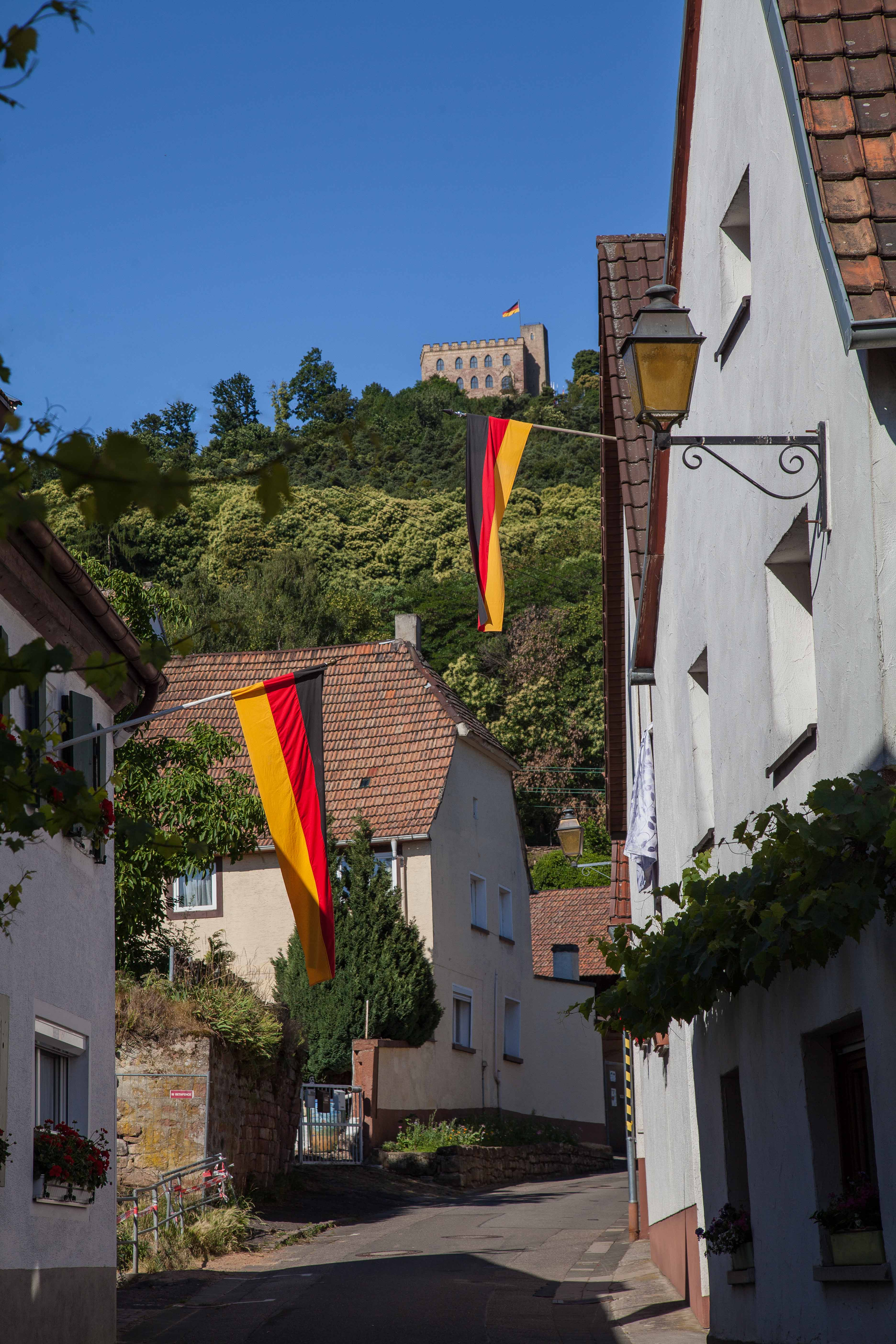 schwarzrotgold - Schloßstraße 76